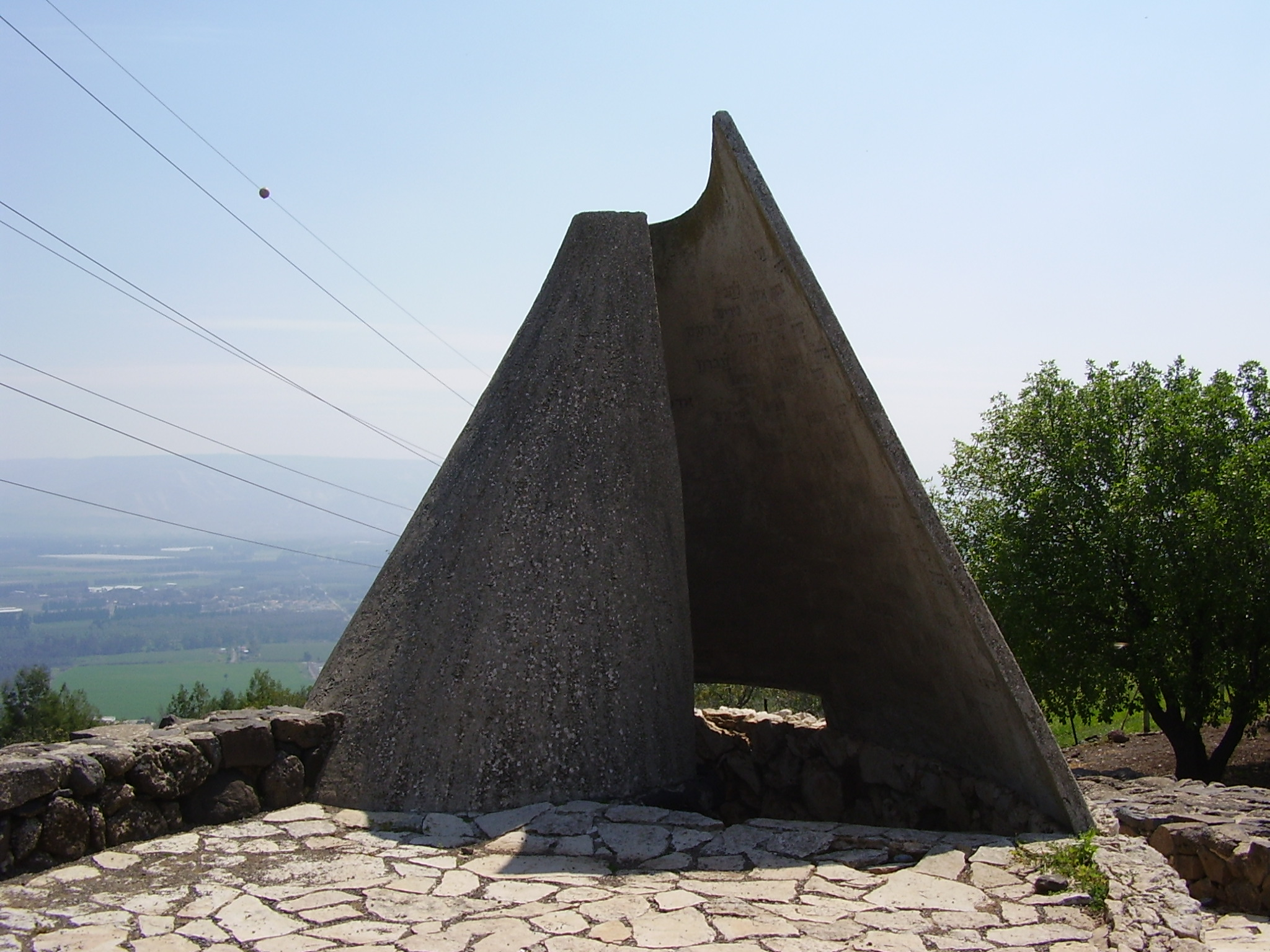 אנדרטת ביתניה עילית